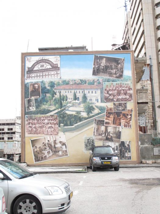 ציור ברחוב המתאר את בית הספר אליאנס:מייסדיו ואורחותיו